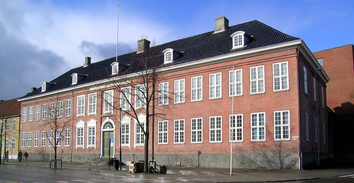 Trondheim katedralskole, Munkegata 8. Bygd 1787. Arkitekt: C.F.Harsdorff.